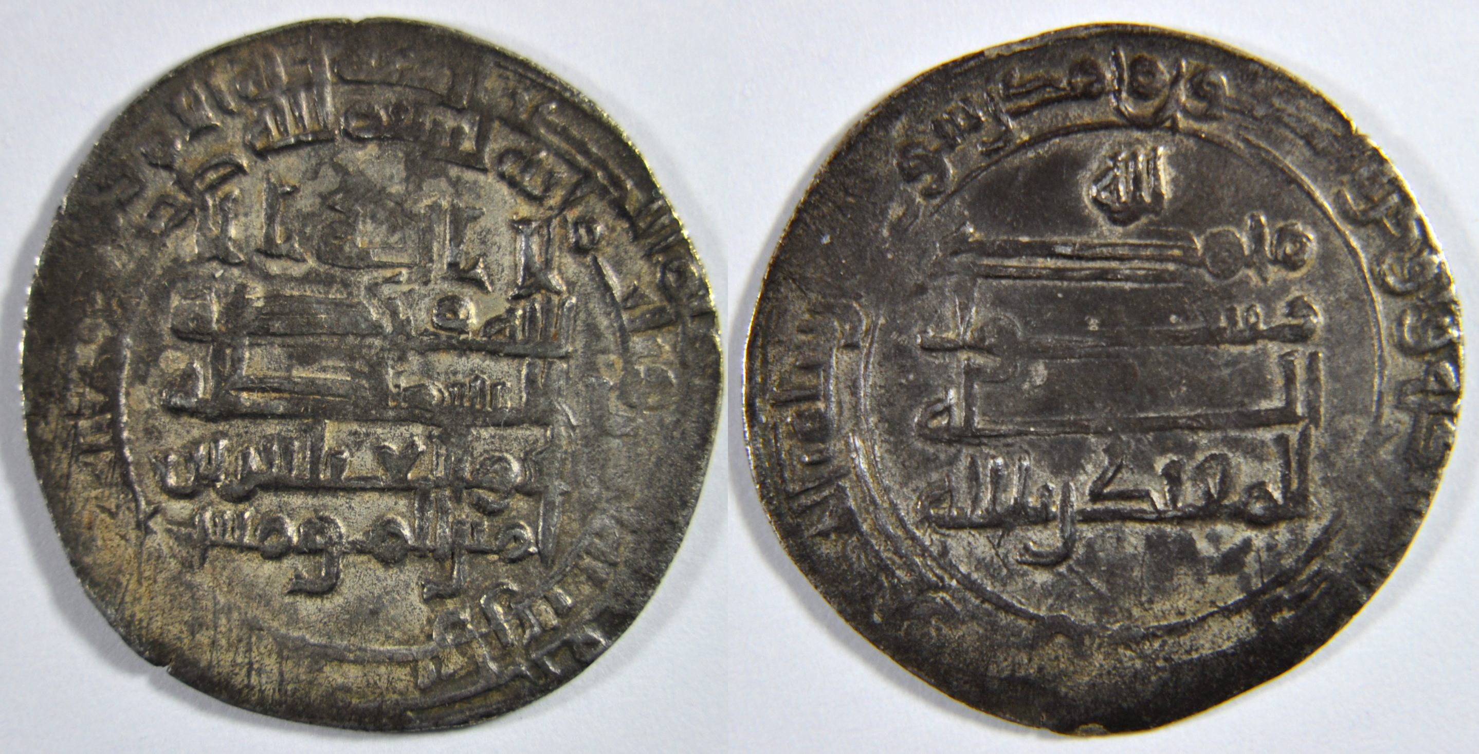 Une monnaie en argent d'un dirham du calife de Bagdad Al Muqtadir (AH 295-320) (908-932 AD) émise à Shiraz en AH 304 (?), dynastie abbasside (AH 132-656) (750-1258 AD). A/ inscription arabe R/ inscription arabe Dimension : 26.87 mm Poids : 3.05 g. Remarque : Ce calife a été un souverain médiocre sans grand intérêt. Référence : Album 246.2; MWI 248 Indice de rareté : commune mais TTB.